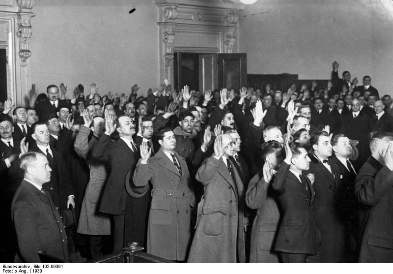 Hier werden die neuen amerikanischen Staatsbürger vereidigt. Die neuen amerikanischen Staatsbürger bei der Leistung ihres Eides durch Handhochheben im grossen Saal des Justizgebäudes in New York.